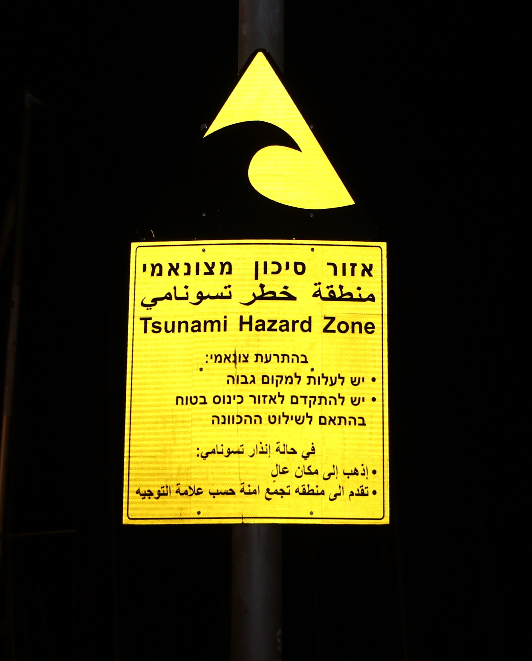 שלט התרעת צונאמי במרינה שבהרצליה